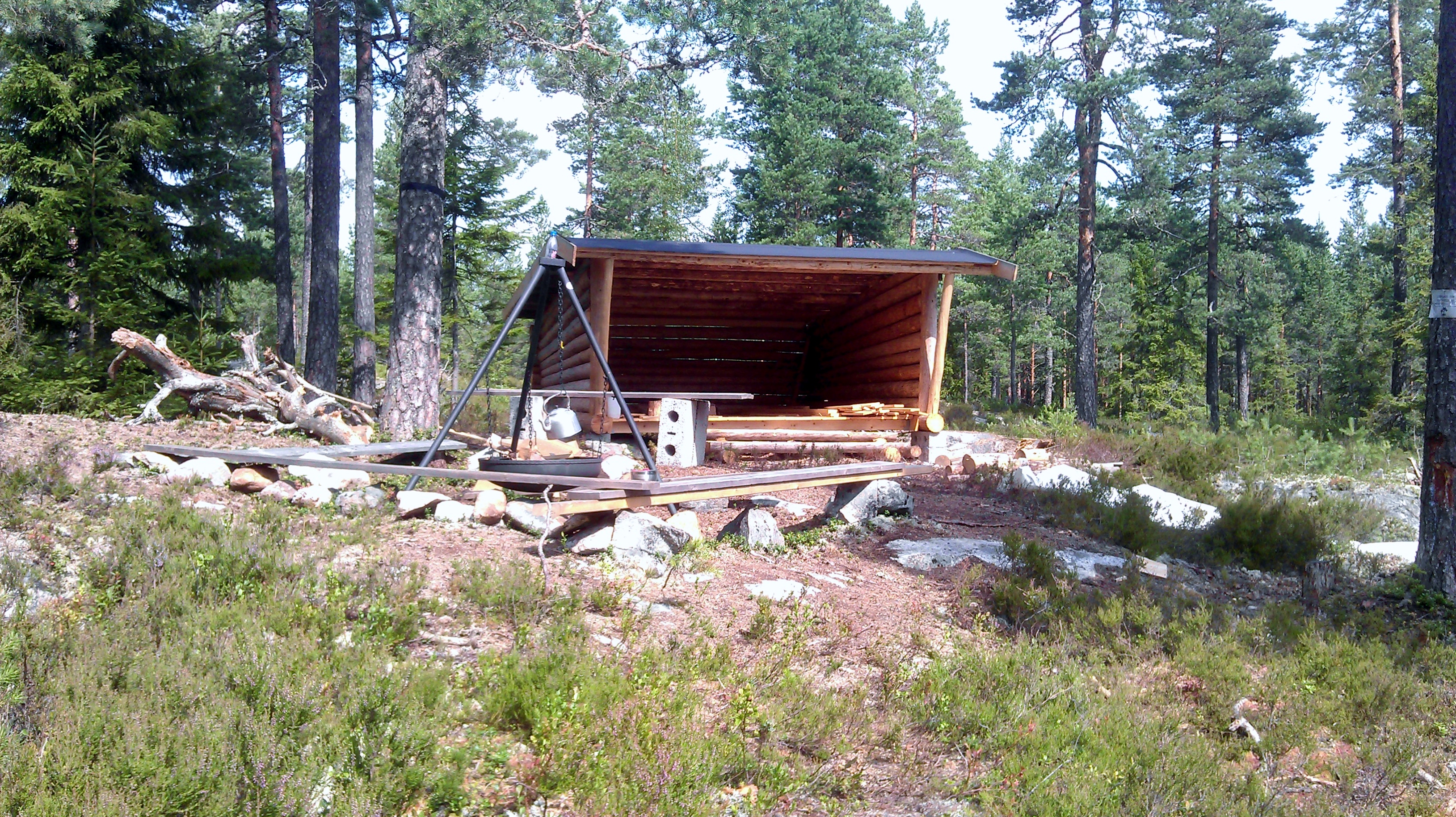 Gapahuk til Haneborg skole - i Dingsrudåsen på Lierfoss i Aurskog-Høland kommune.